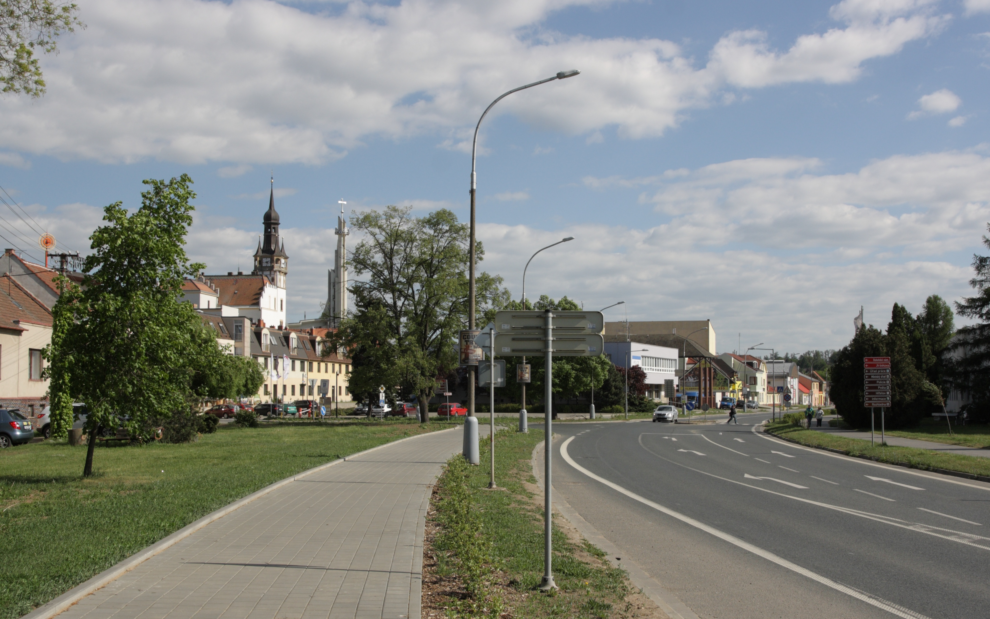 Hustopeče - ulice Brněnská.